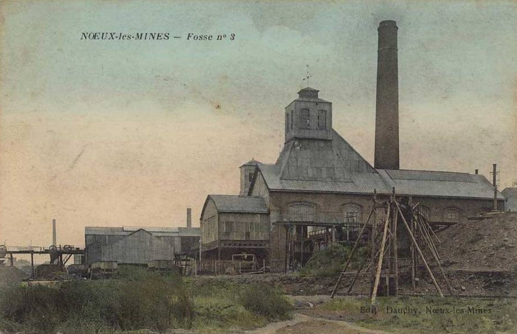 Photochrome de la Fosse n° 3 - 3 bis de la Compagnie des mines de Nœux, Nœux-les-Mines, Pas-de-Calais, Nord-Pas-de-Calais, France.